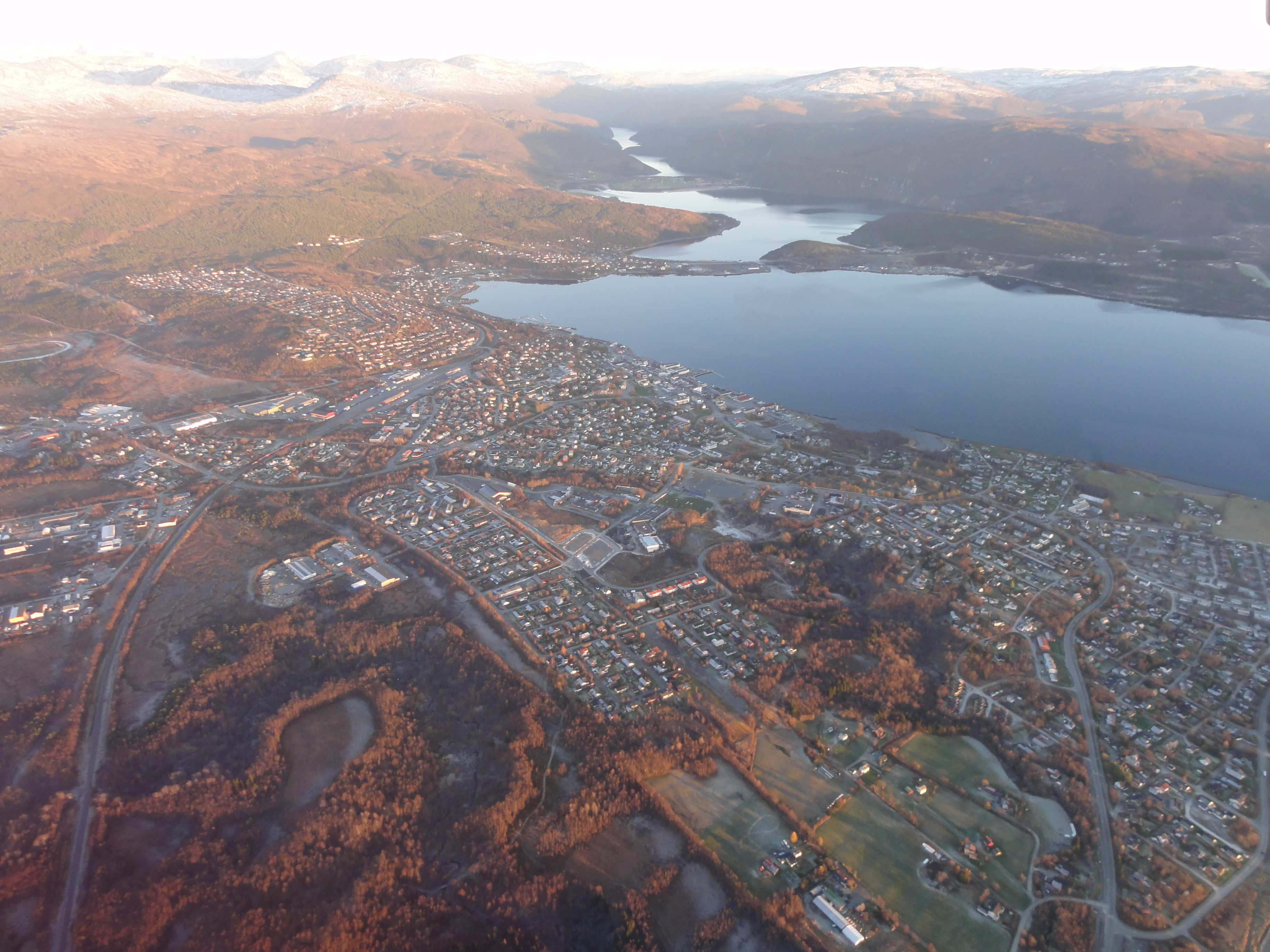 Fauske og Finneid sett fra fly. Fauskevika, Nervatnet, Vatenbygda, Moen, Øvervatnet, samt Sulitjelmafjellene er synlige